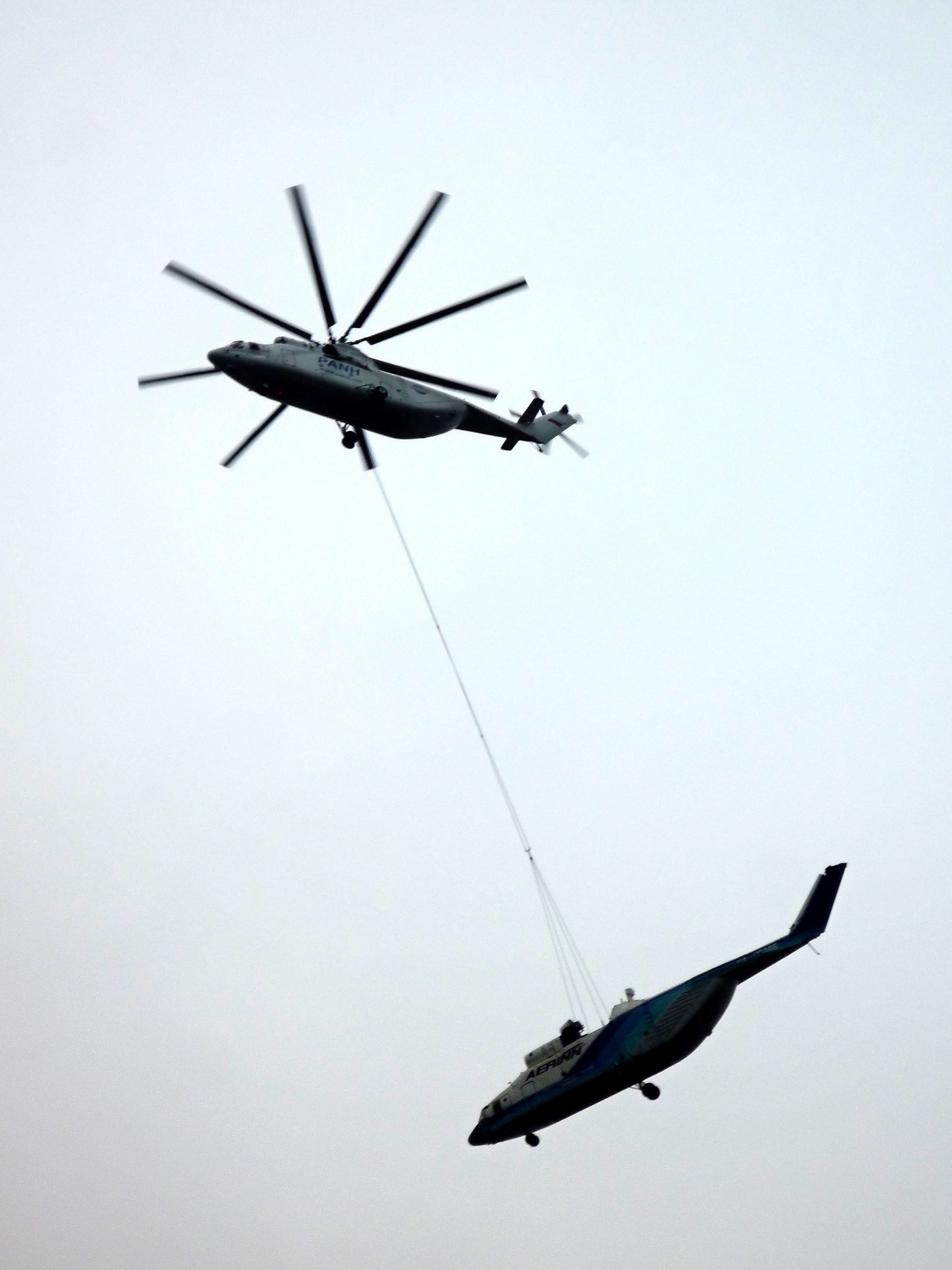 Ми-26НЕФ-М транспортируется на внешней подвеске Ми-26Т,вероятнее всего в Ростов-на-Дону на ОАО Роствертол.Окрестности г.Новочеркасска.